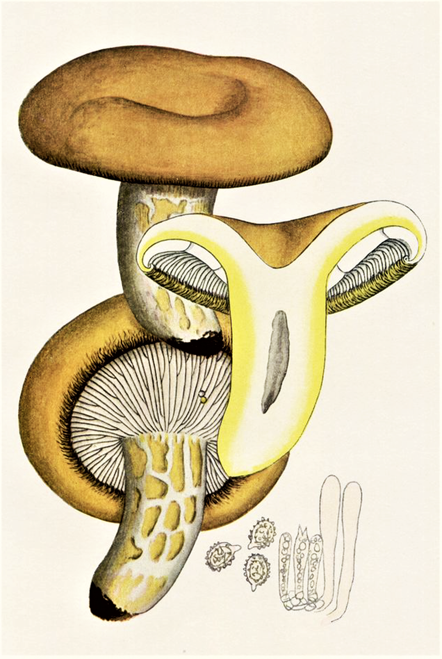 Bres.: Lactarius scrobiculatus (Scop., 1772) Fr. (1838)